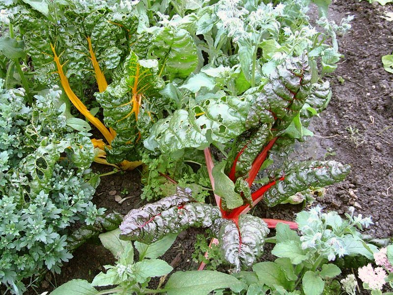 gelber und roter Mangold, chard